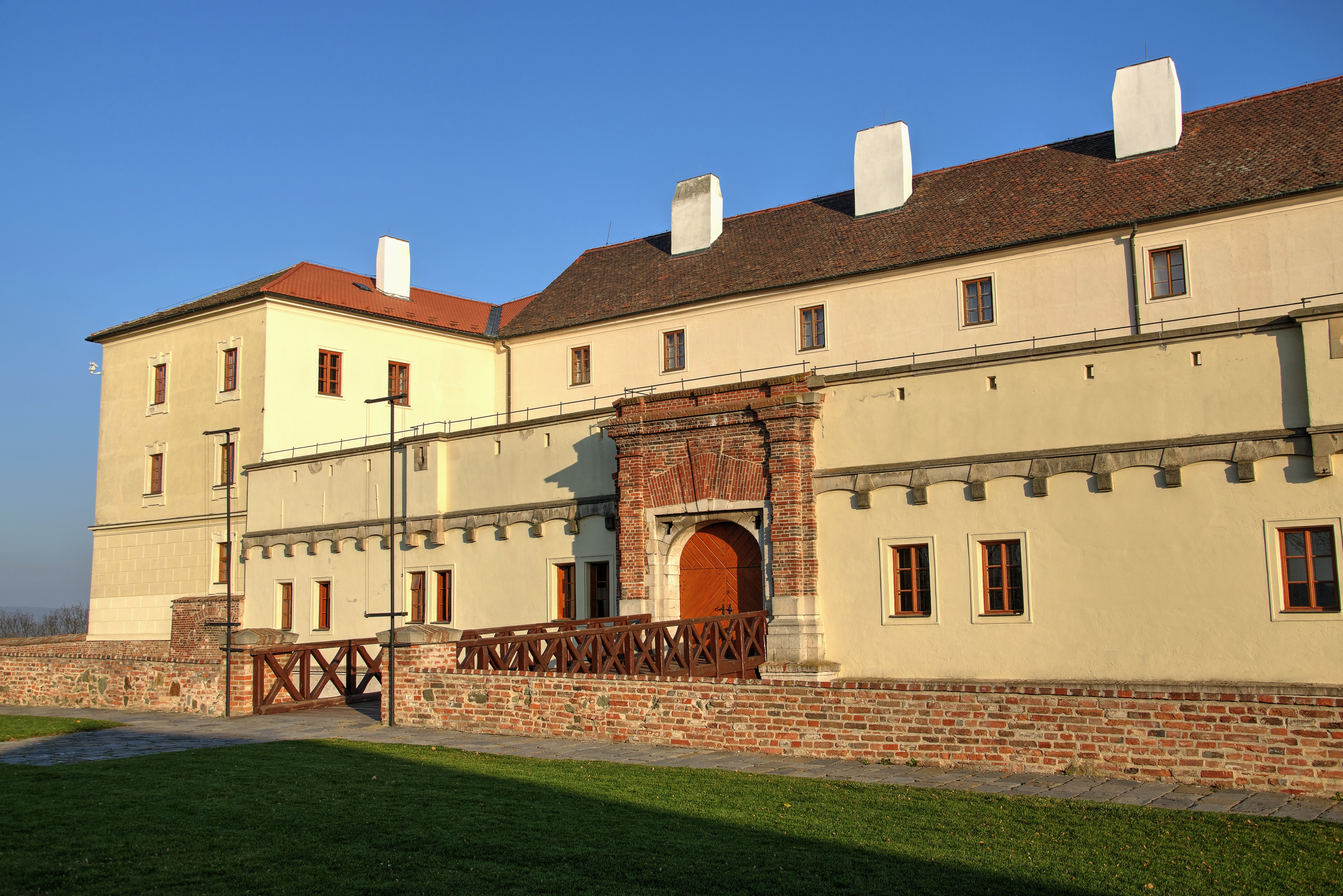 Hrad Špilberk